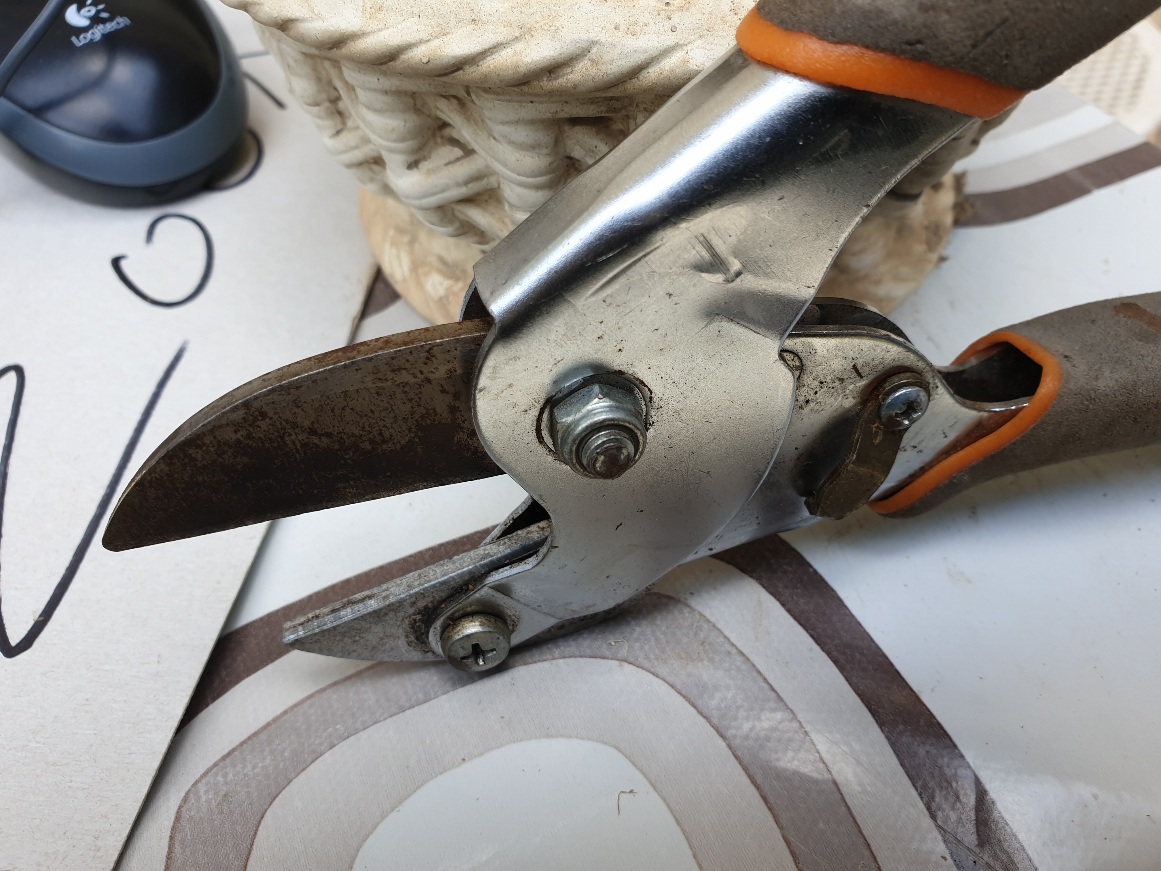 מזמרה מסוג סדן